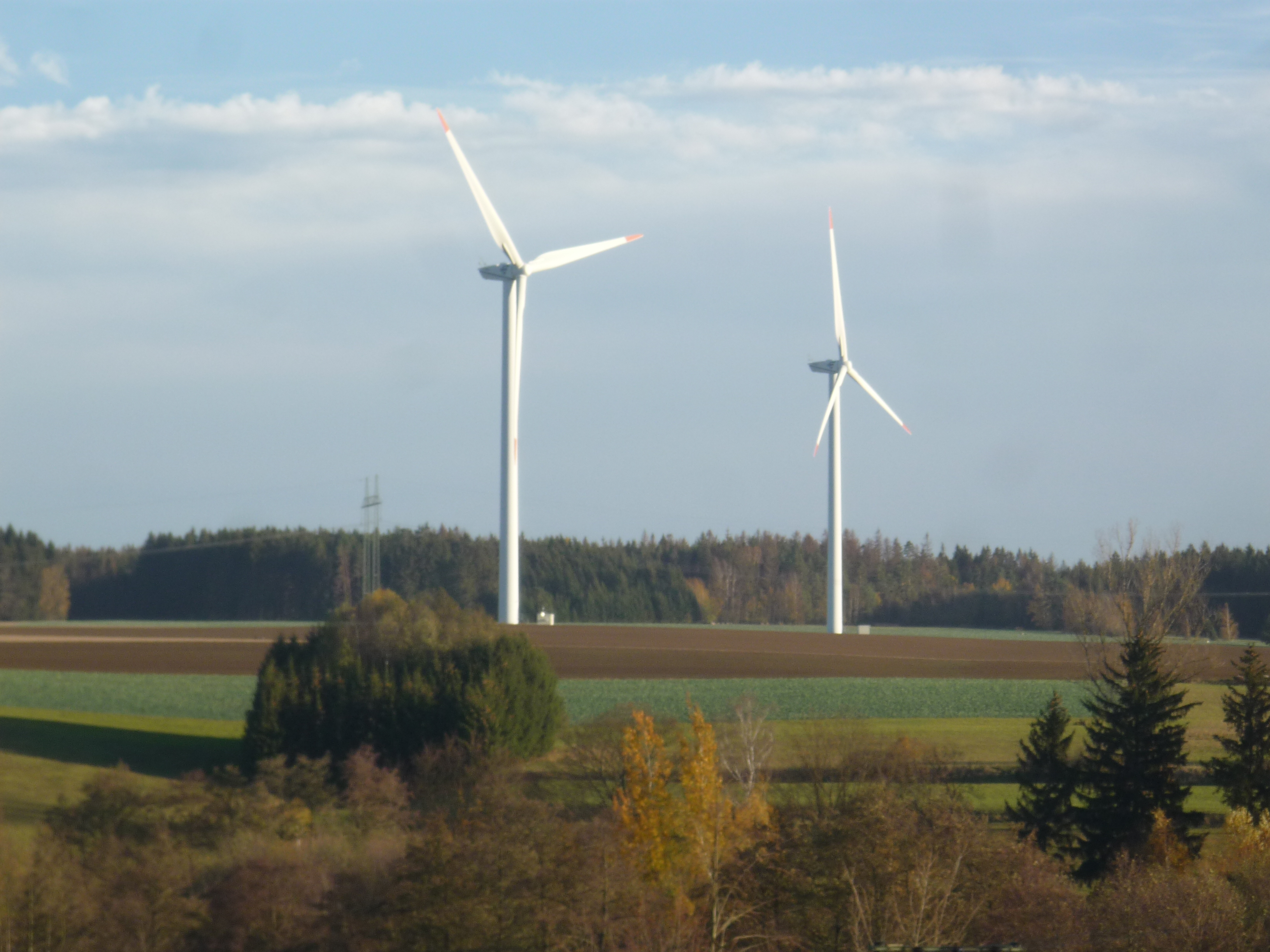 Autor fotografie a videa Jiří Zelenka. Větrné elektrárny. Horní věžnice. okr.Havlíčkův Brod. Kraj Vysočina. Czech Republik.